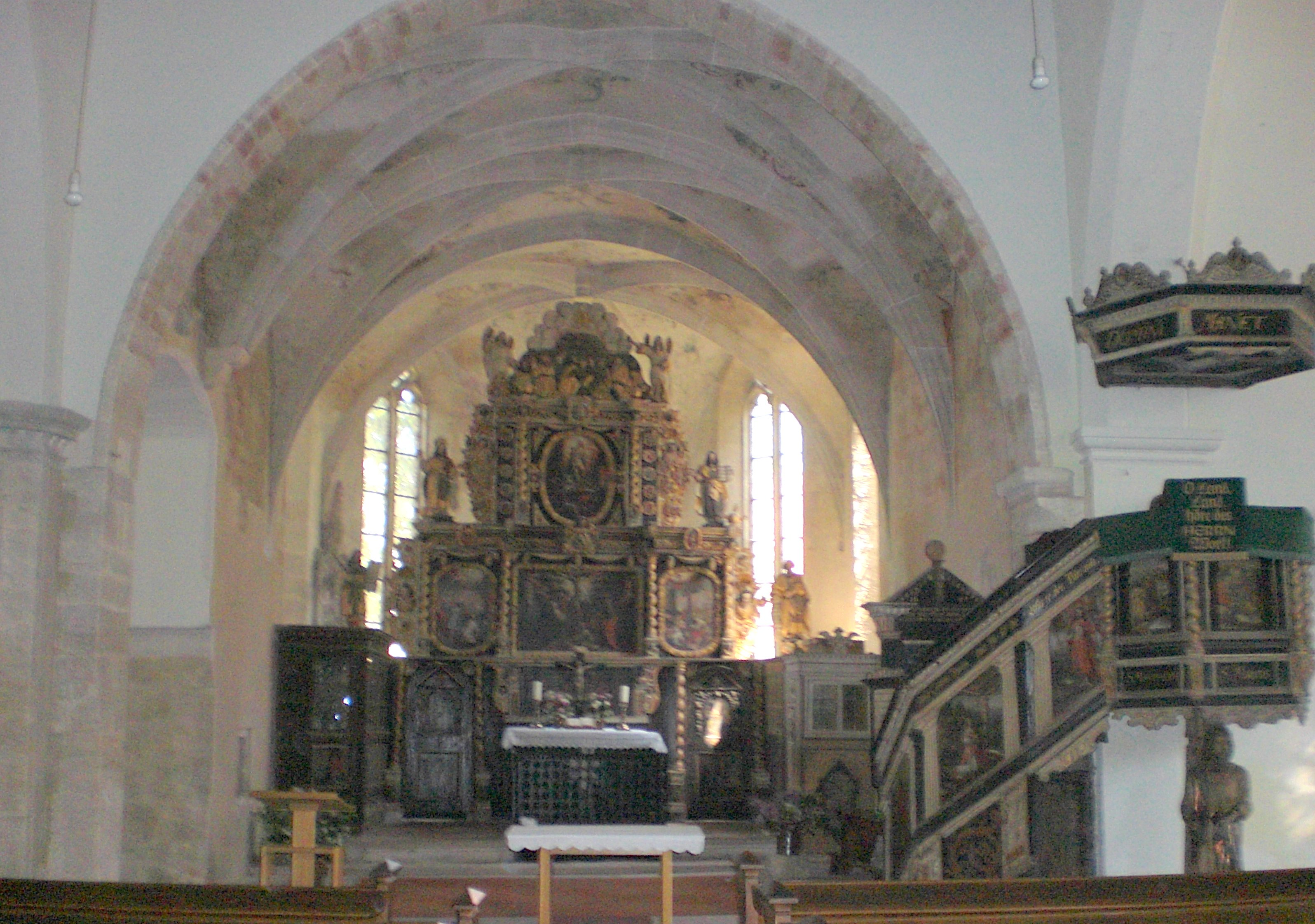 Chor und Altar in der Martinkirche in Kroppenstedt